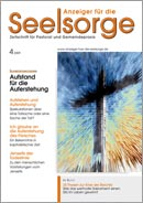 Heftcovder